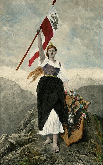 Tyrolia